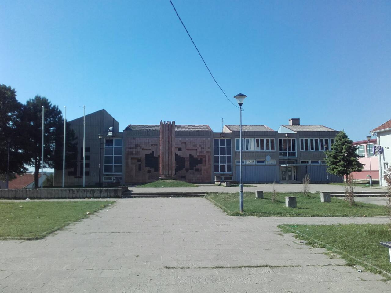 Pogled na Spomen dom u Vraniću - pogled sa prednje strane